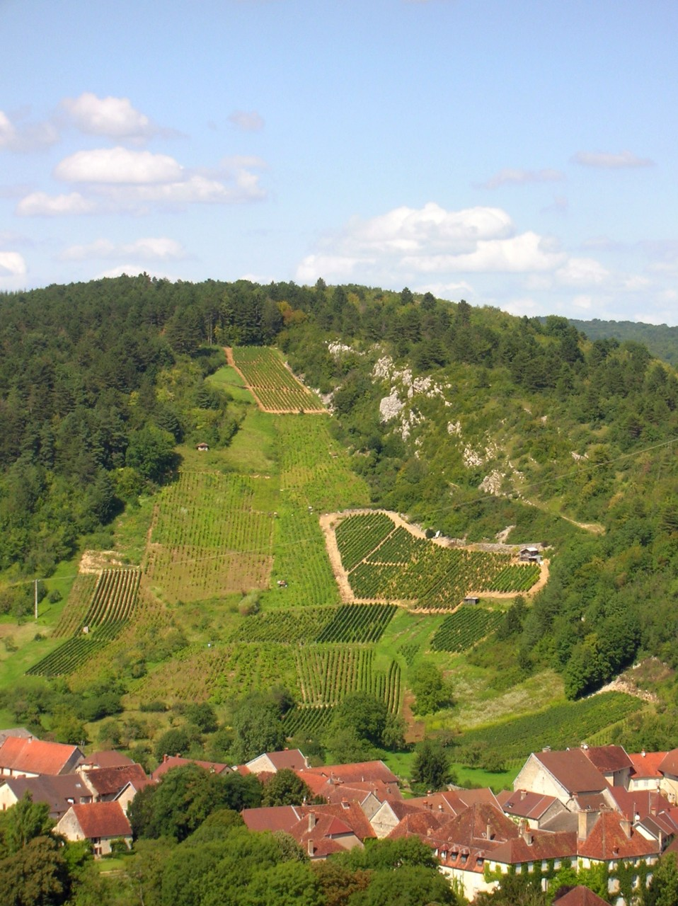 Vignes de Bauquet, village de Port-Lesney, département du Jura, France